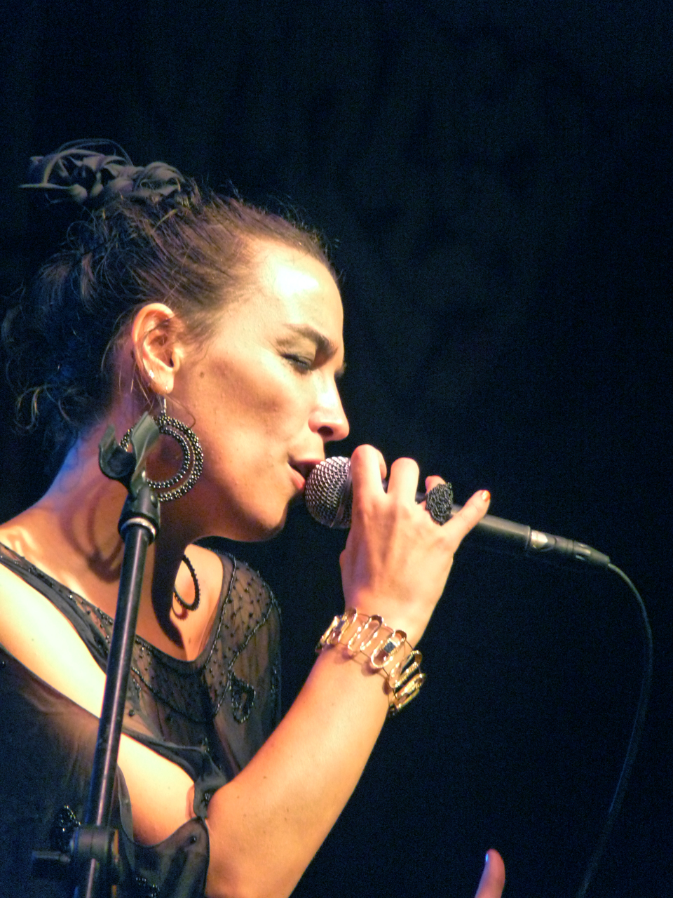 Greta Panettieri all'Eklettica Fest a Roma